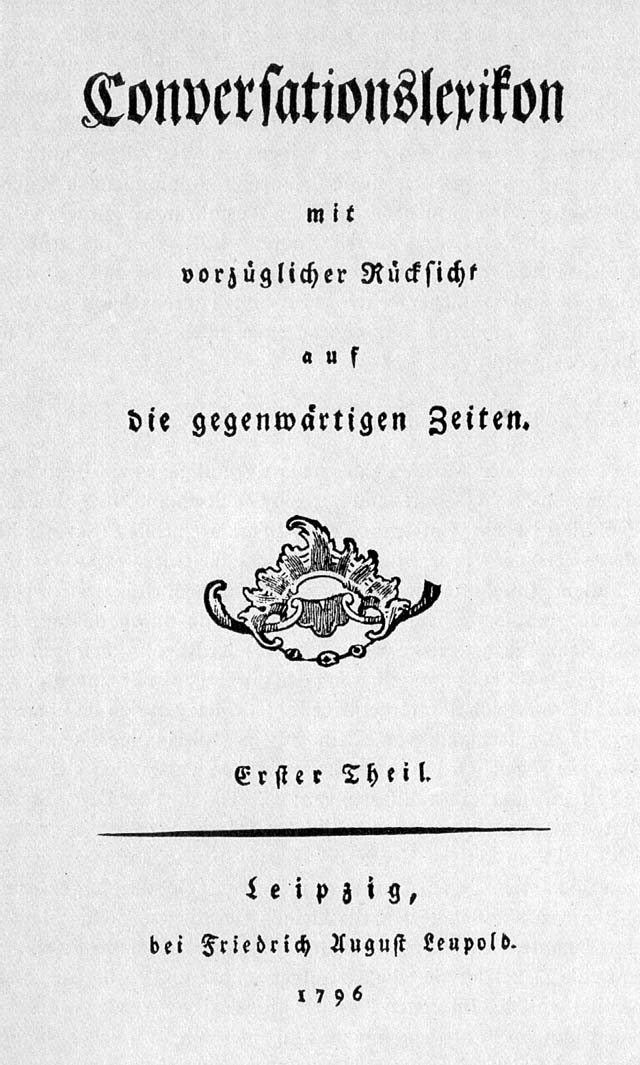 Titelseite des 1. Bandes von Löbels und Frankes "Conversationslexikon" von 1796 (siehe Konversationslexikon)